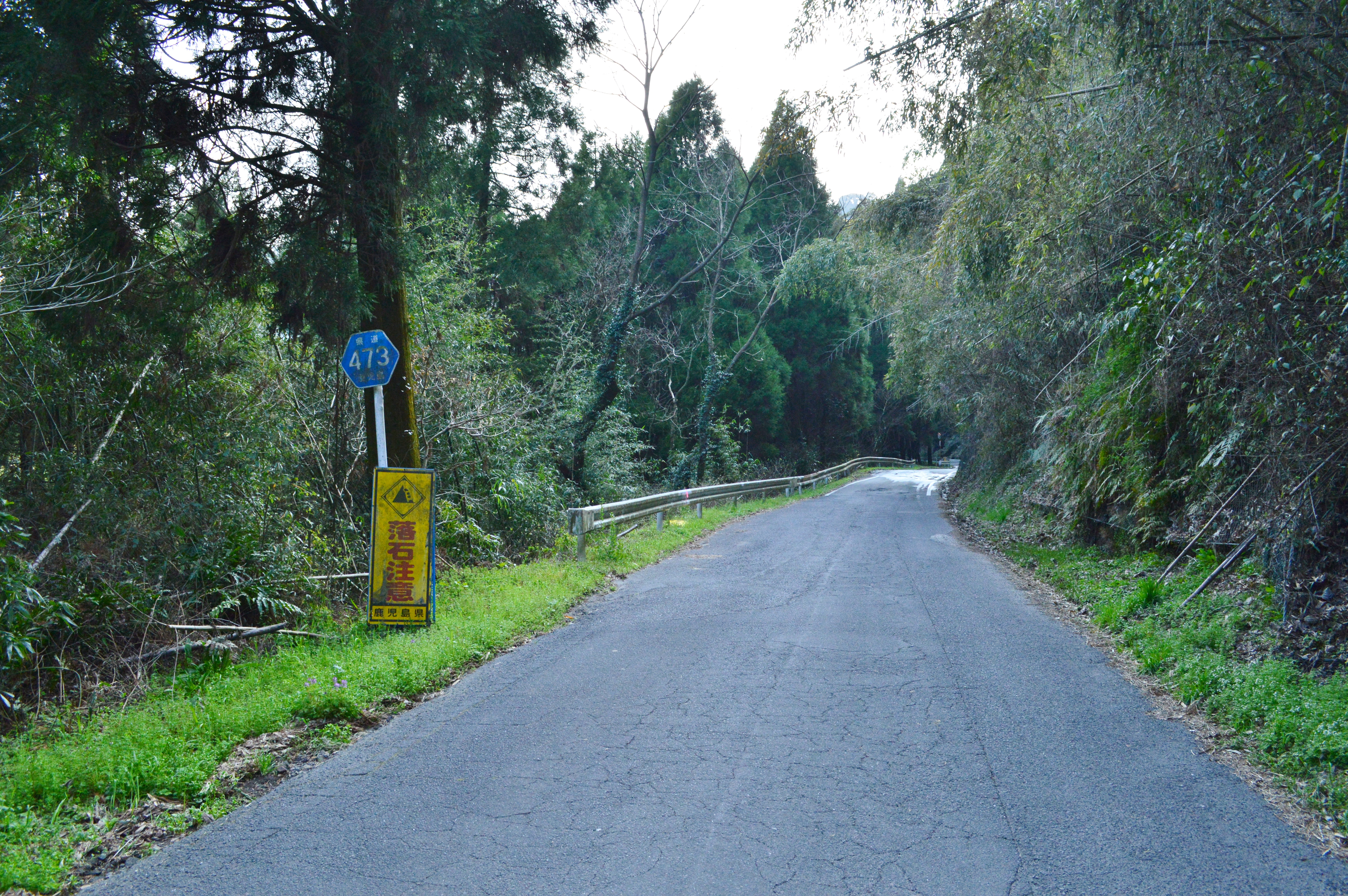 鹿児島県道473号 (霧島市隼人町朝日地点)